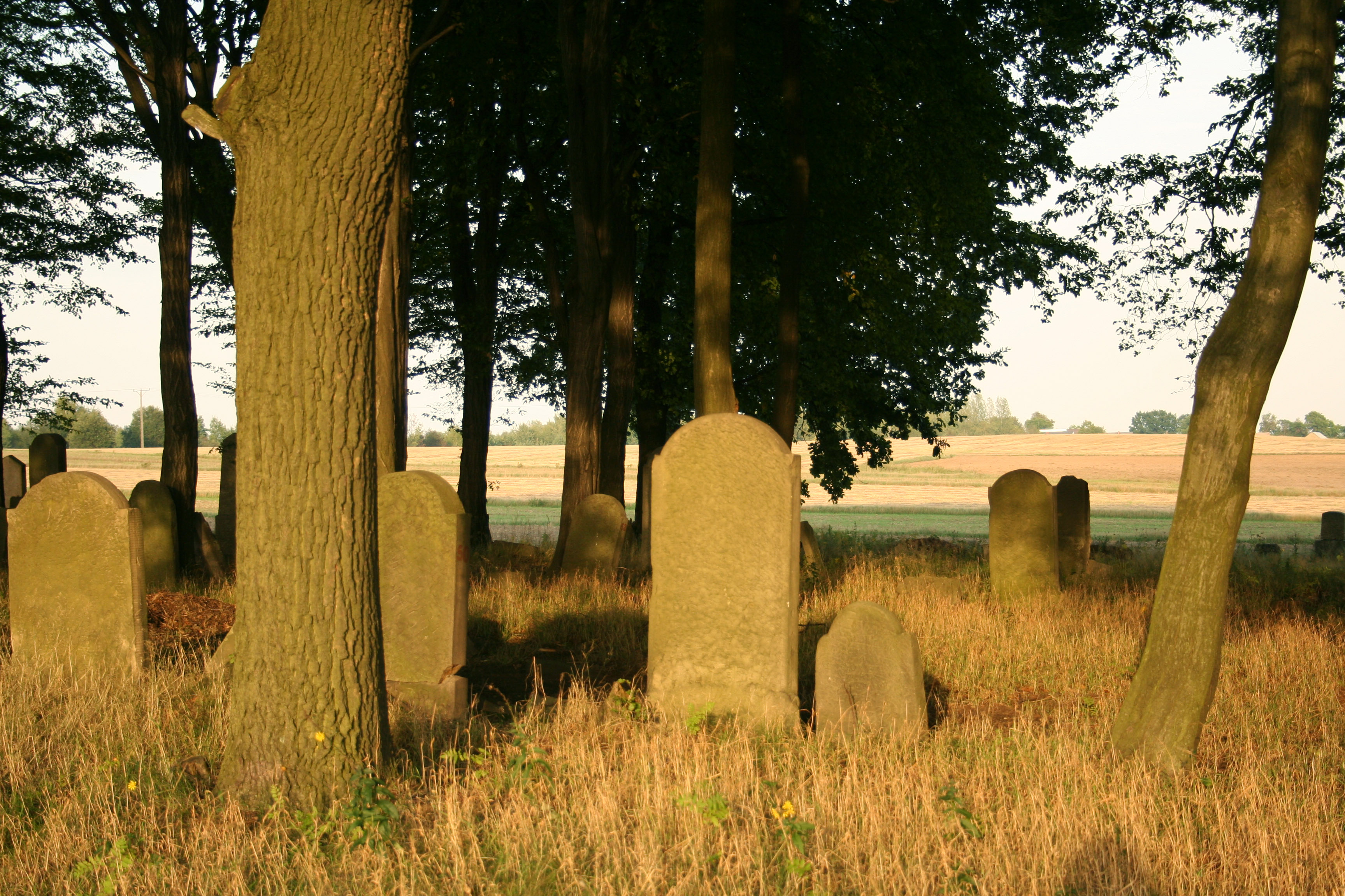 macewy na cmentarzu żydowskim w Cieszowej, powiat lubliniecki